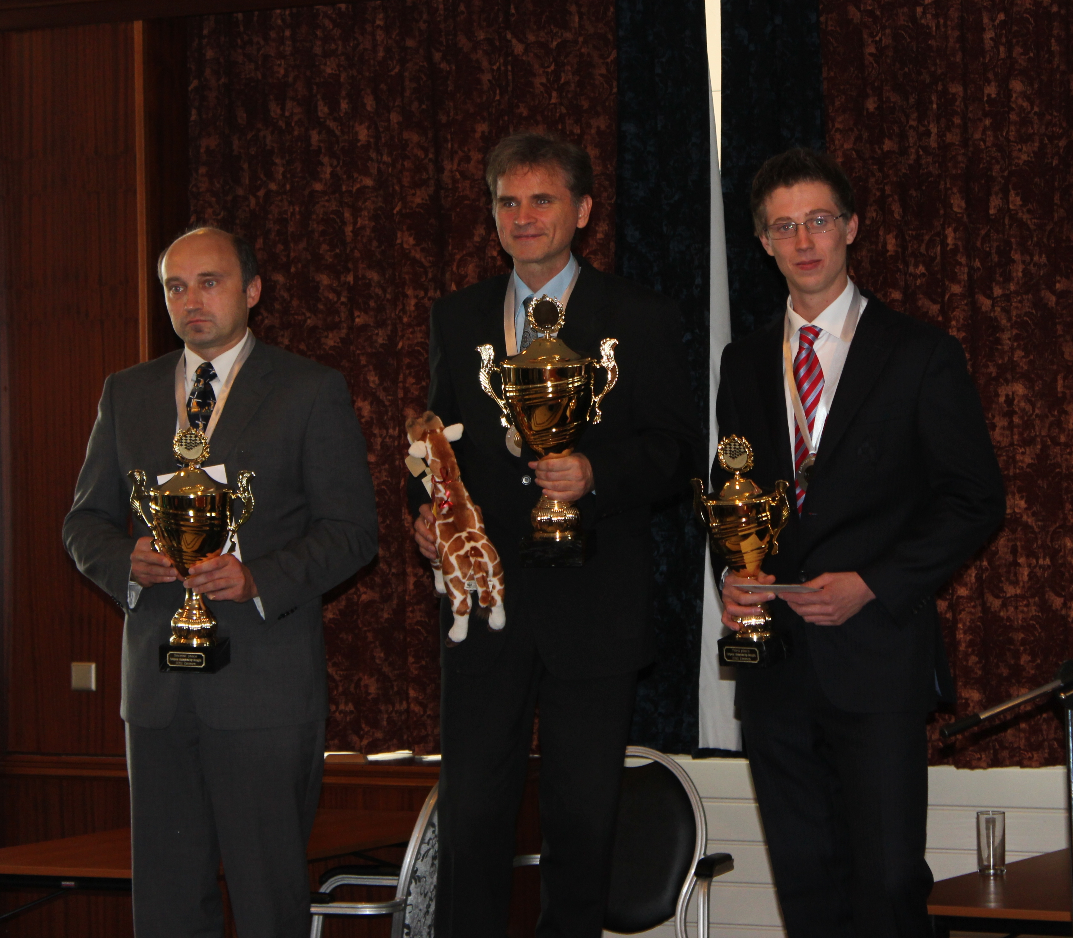 2012. aasta Euroopa meistrivõistlused rahvusvahelises kabes Emmenis, 22. september 2012. Poodiumil seisavad Guntis Valneris, Aleksei Tšižov ja Pim Meurs.